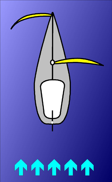 Schmetterling (Segeln)